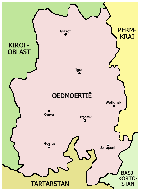 Kaart van Oedmoertië in Rusland